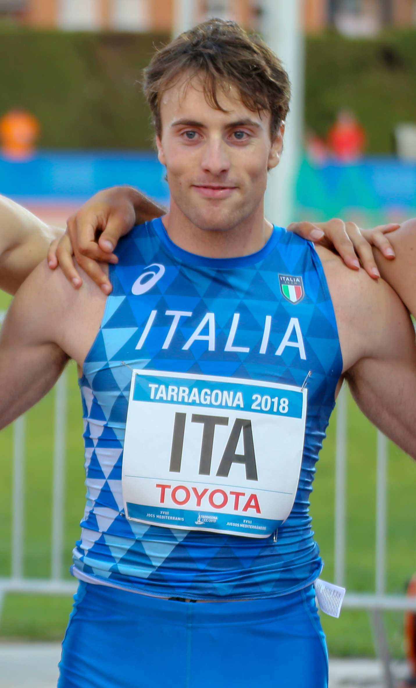 Michele Tricca en los relevos 4x400 en los Juegos del Mediterráneo 2018